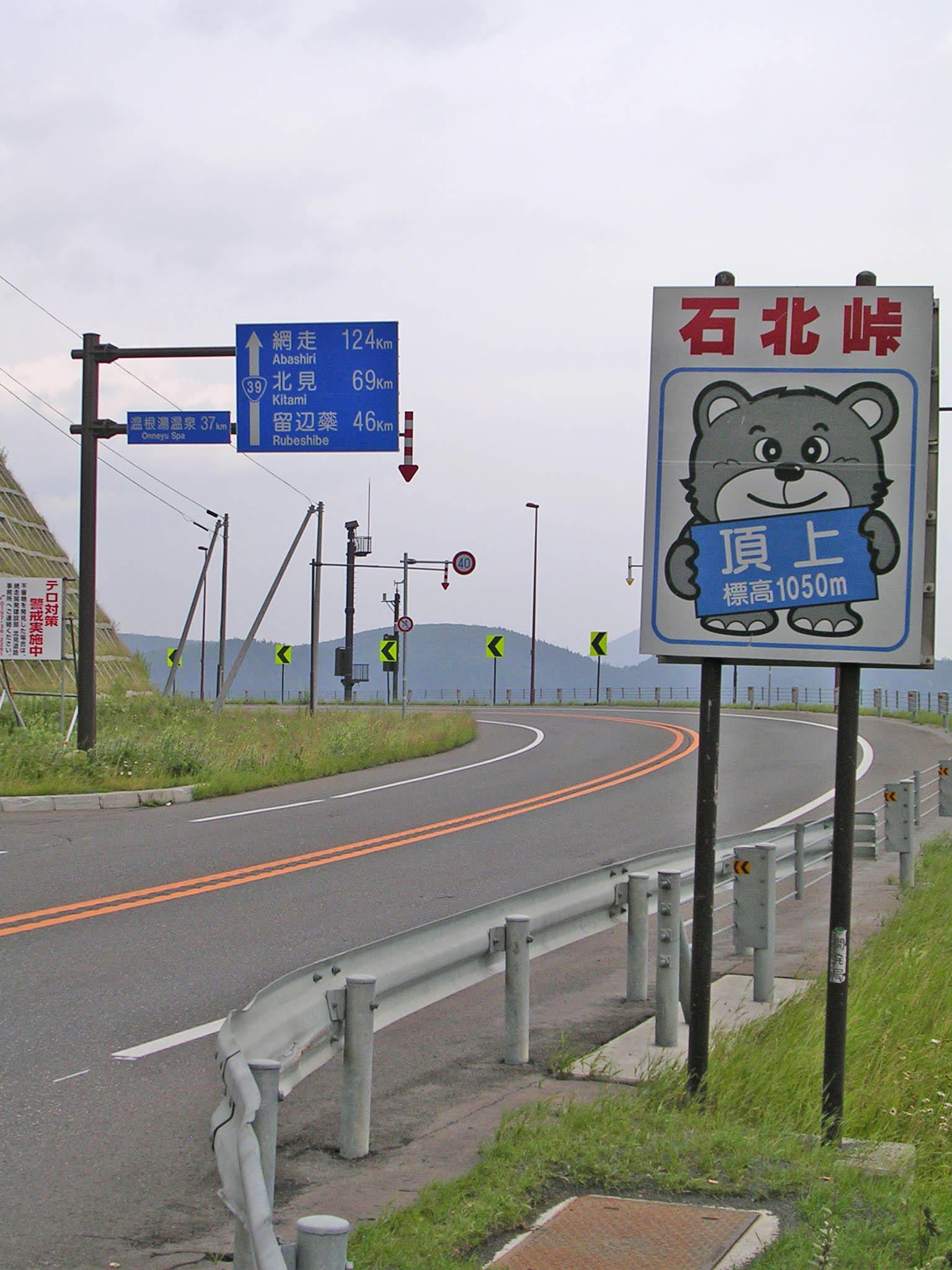 Sekihoku pass,Hokkaido,Japan